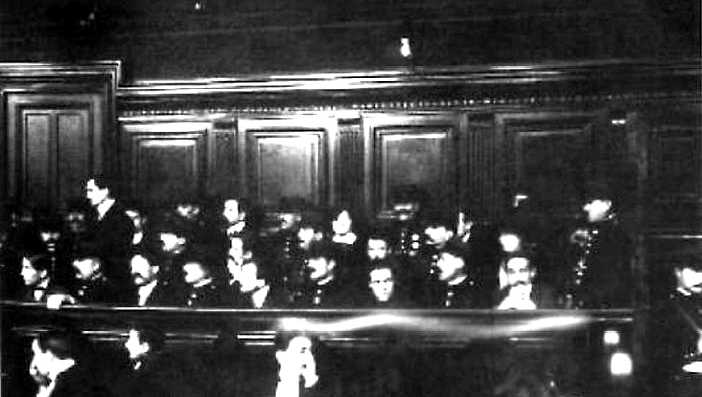 Foto de 1913 dos integrantes do grupo anarco-ilegalista francês conhecido por Bando Bonnot.